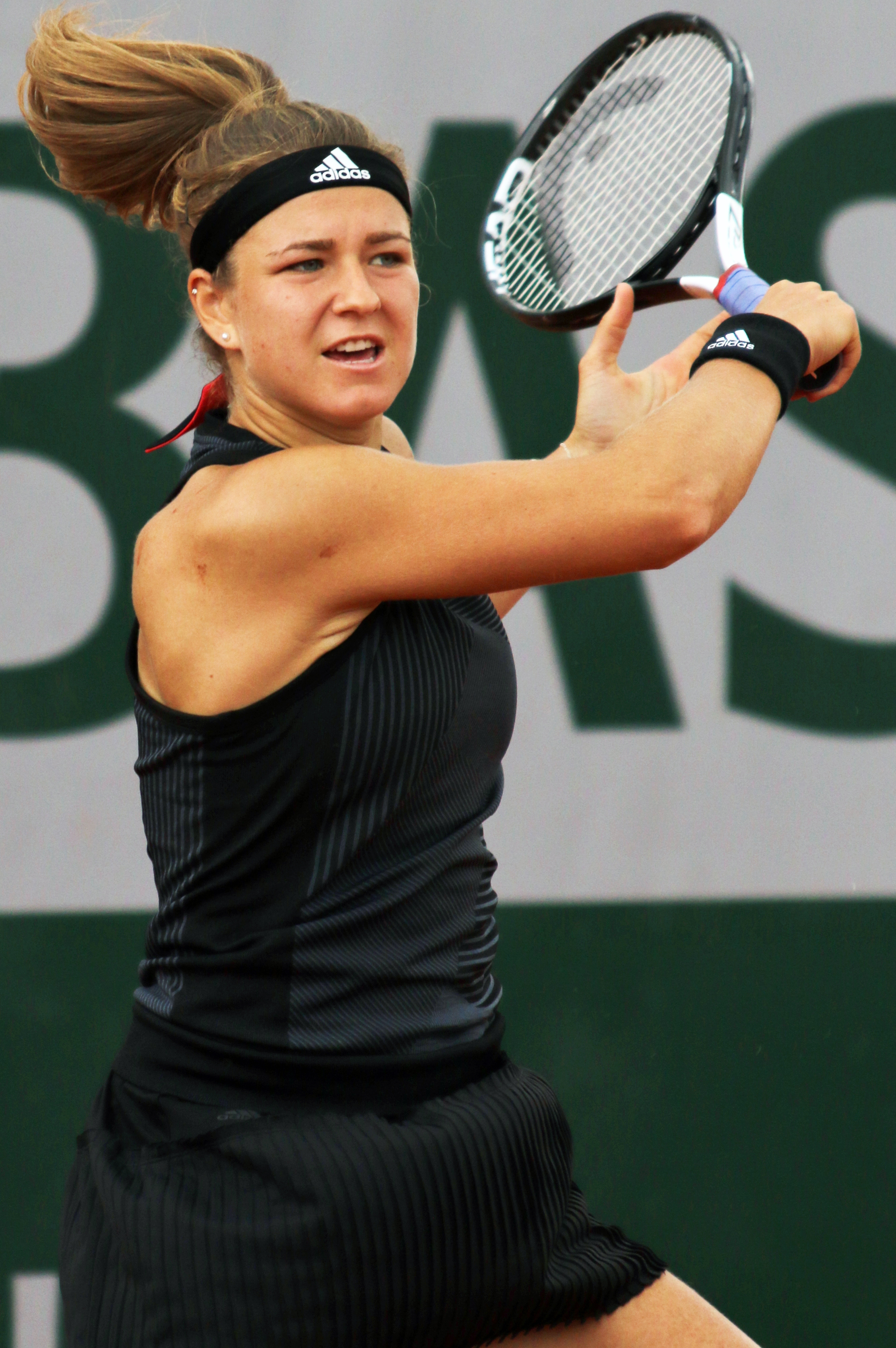 Muchova RG19 (14)